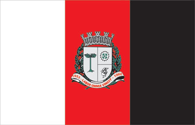 Bandeira Oficial do Município de Taboão da Serra